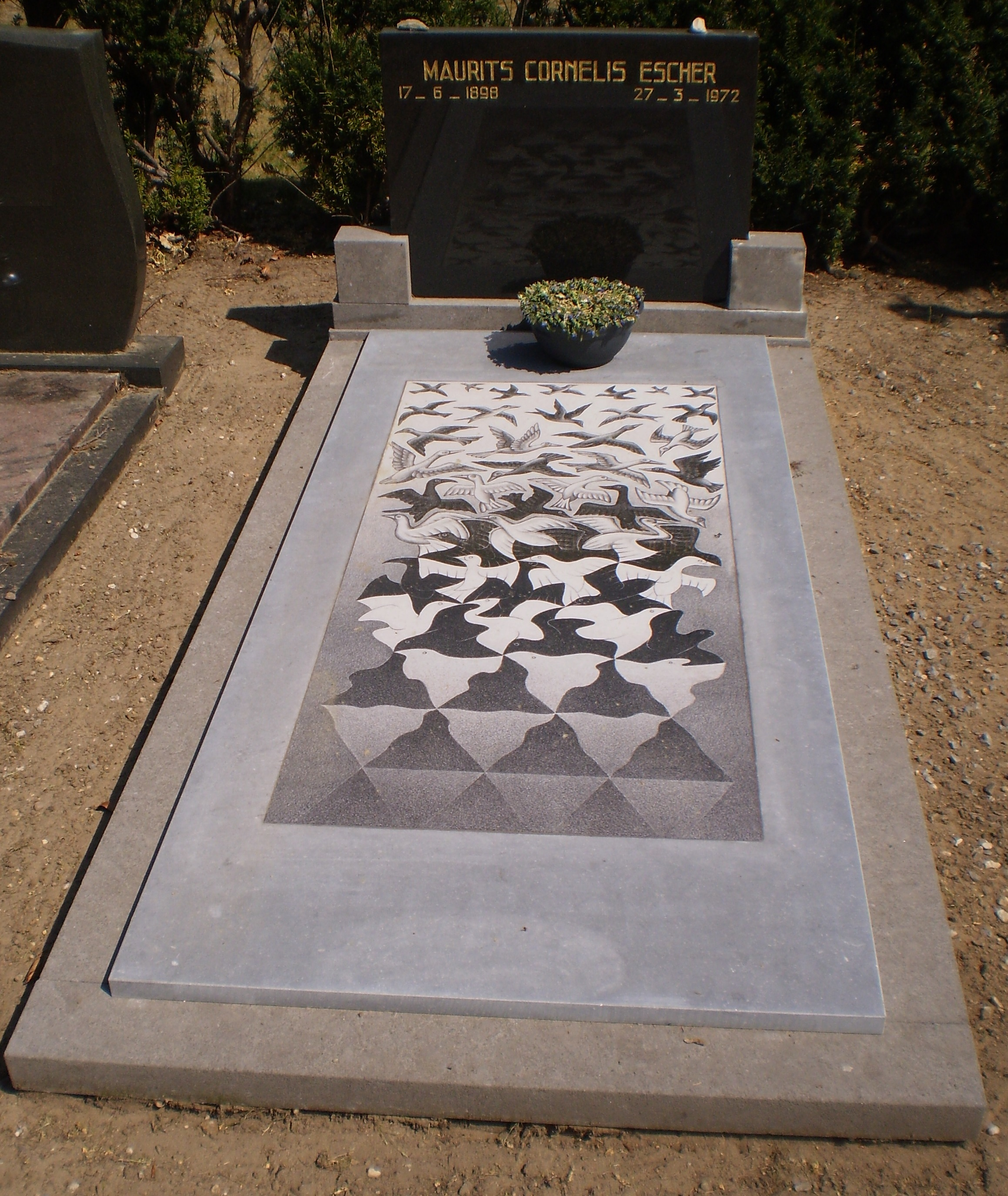 Graf van M.C. Escher op de Nieuwe algemene begraafplaats in Baarn. Op de afdekplaat een voorbeeld van zijn werk.